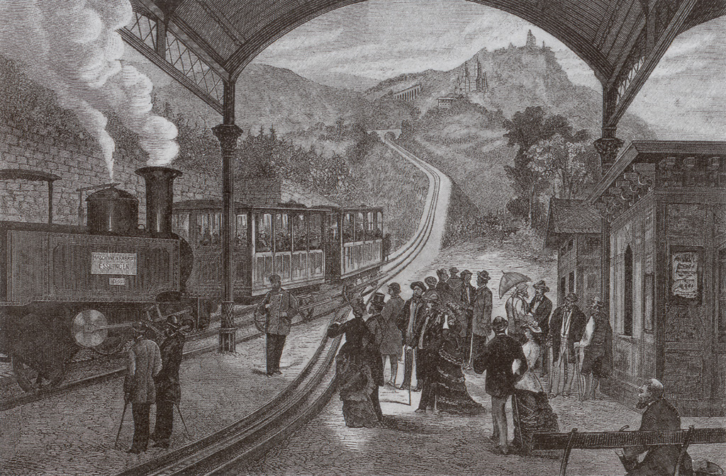 Der Talbahnhof der Zahnradbahn zum Drachenfels in einer Originalzeichnung von Rudolf Lichtenberg kurz nach der Fertigstellung.